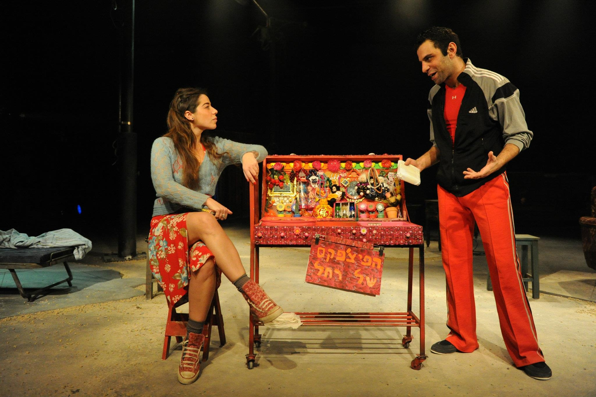 לאה קמחזי ואלי מנשה בהצגה "אברהם", מאת דוד לוין, בבימויו של עודד קוטלר, בתיאטרון אנסמבל הרצליה